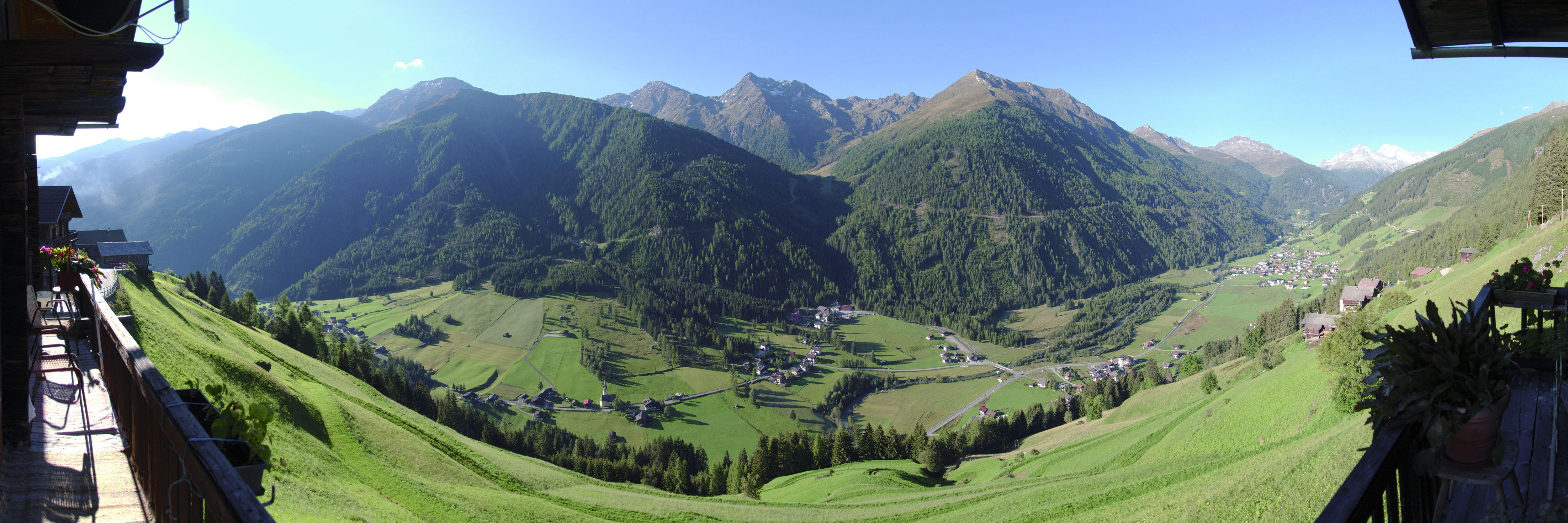 Villgratner Berge mit Roter Spitze, Weißer Spitze, und im Vordergrund dem Defereggental; rechts St. Jakob in Defereggen